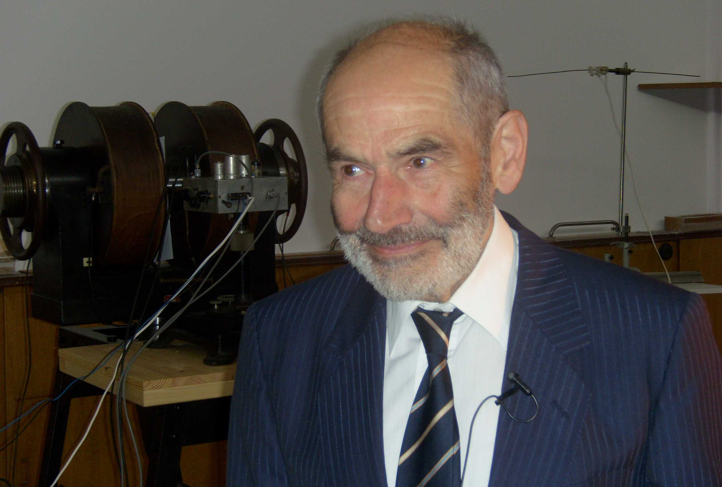 Prof. Dr. Gerhard Scheler zu seinem Ehrenkolloquium anläßlich seines 80. Geburtstages